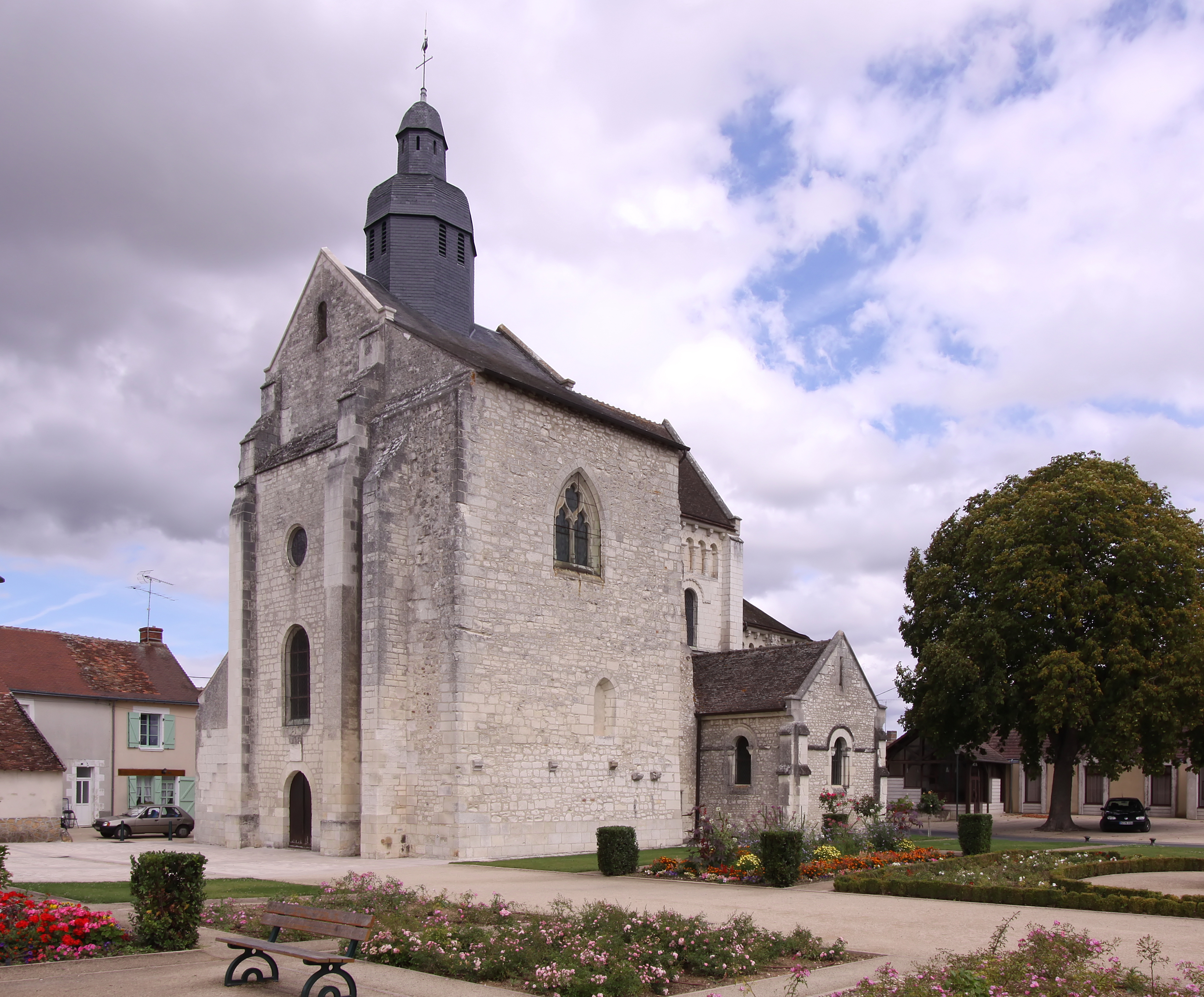 Kirche Sainte-Vierge in der französischen Ortschaft Saint-Genou im Département Indre